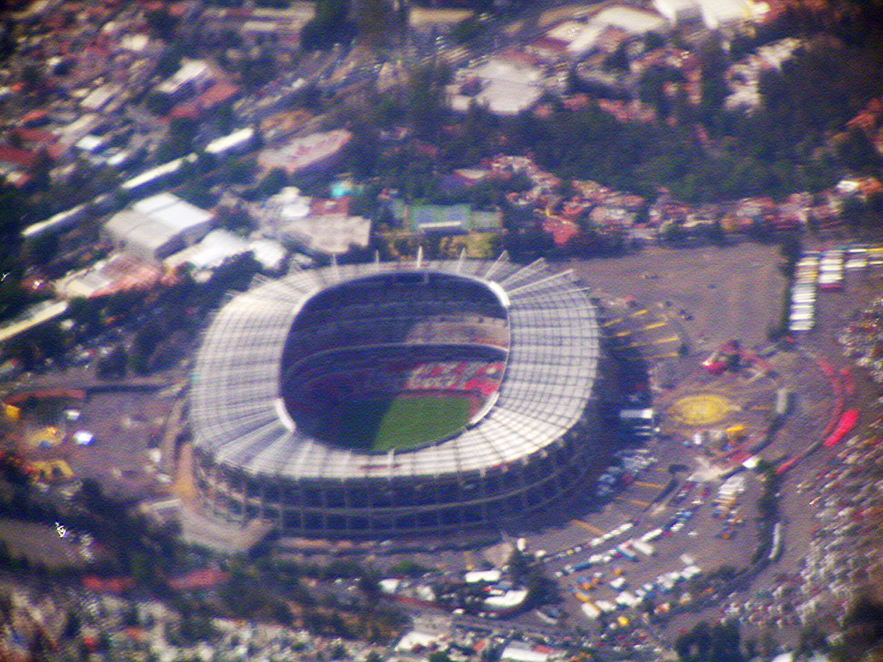 Estadio Azteca from 28000 feet.